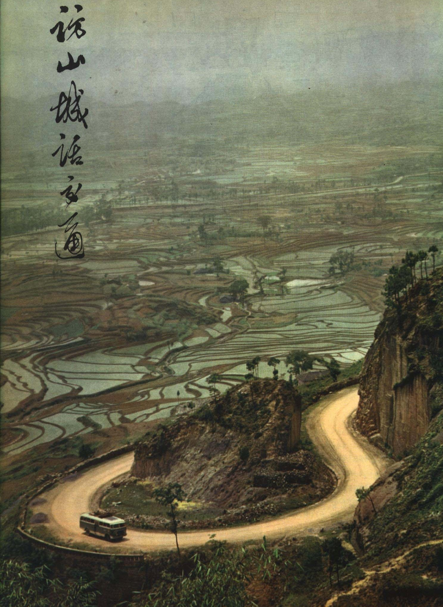 1963-09 1963年 重庆